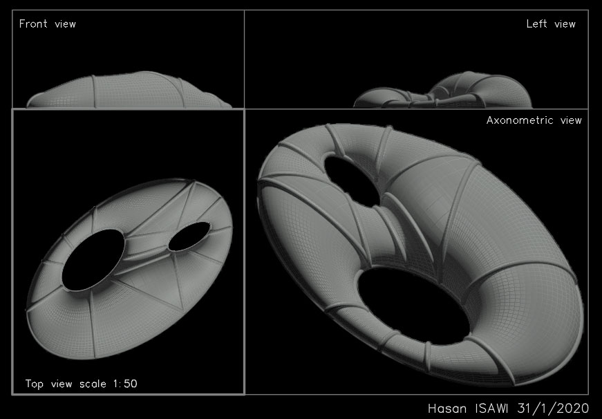 dati tre coniche generiche in cui due di loro interne alla terza ellisse, e poi trasformati in ellissoidi di rotazione, si ha che la loro superficie inviluppante e' una torica ellittica con due buchi